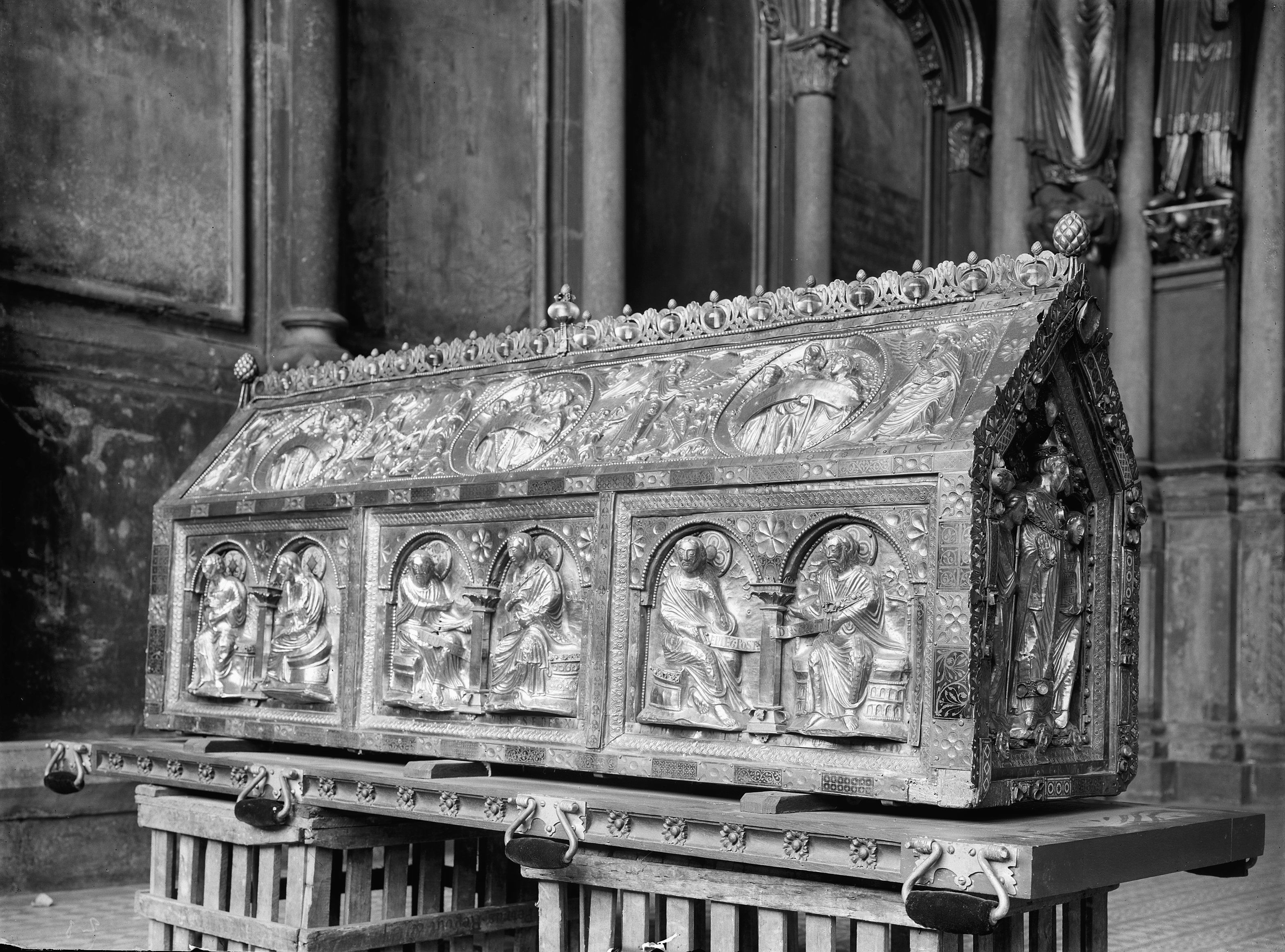 Sint-Servaaskerk: de "Noodkist", het romaanse reliekschrijn van Sint-Servaas, hier tijdelijk opgesteld in het Bergportaal.